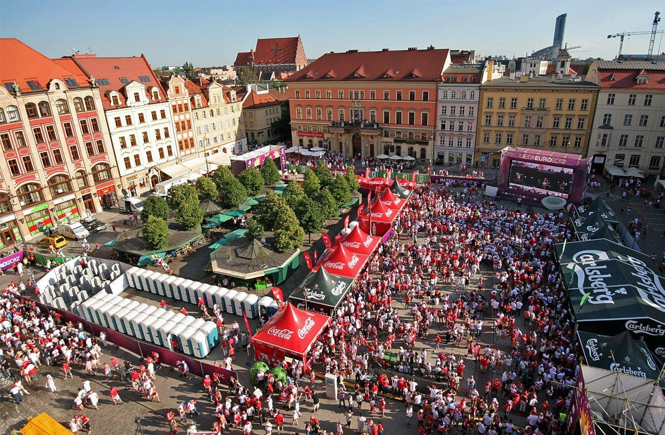 Strefa kibica na placu Solnym szybko się zapełniała